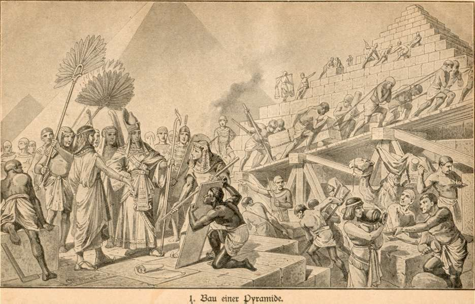 Bau einer Pyramide (etwa 2900 v.Chr.). Einer der mächtigen ägyptischen Könige des Alten Reiches von Memphis besichtigt den Bau seiner Grabpyramide. Die Grabkammer mitten im Innern, deren Zugang noch offen bleibt, ist längst fertig; doch Jahr um Jahr wird von unten nach oben ein neuer Steinmantel aufgelegt, so daß die Pyramide mit jedem Regierungsjahr des Königs an Größe wächst. Die von den Steinmetzen unter sorgsam hergerichteten Kalksteinquadern werden auf einer Bretterbahn mühsam hinaufgeschafft; unzählige Menschen, Sklaven und Kriegsgefangene, von denen viele den Anstrengungen im Brande der Wüstensonne erliegen, sind dabei tätig; nur Hebebäume und Walzen sind ihre einfachen Hilfswerkzeuge. - Zwei Priester erläutern dem Pharao den Bauplan auf der Steintafel, die ein knieender Sklave hält. Der eine der Priester trägt eine Perücke, der andere (der Baumeister) das vor der Sonne schützende Faltentuch über dem glattrasierten Kopfe. Der Herrscherstab und der schlangenartige Schmuck am Stirnreif der Krone bezeichnen den König als Herrn über Leben und Tod. Diener mit großen Fächer wedeln ihm Kühlung zu; links hinter ihm steht der Führer der bewaffneten Leibwächter. - Die gewaltige Pyramide im Hintergrunde ist etwa 150 m hoch; ihre Stufen sind verkleidet und der Zugang zur Grabkammer ist vermauert worden, nachdem sie die Mumie ihres Erbauers aufgenommen hat.